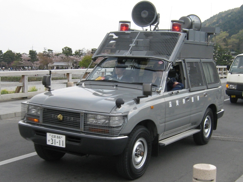 機動隊の現場指揮官車。